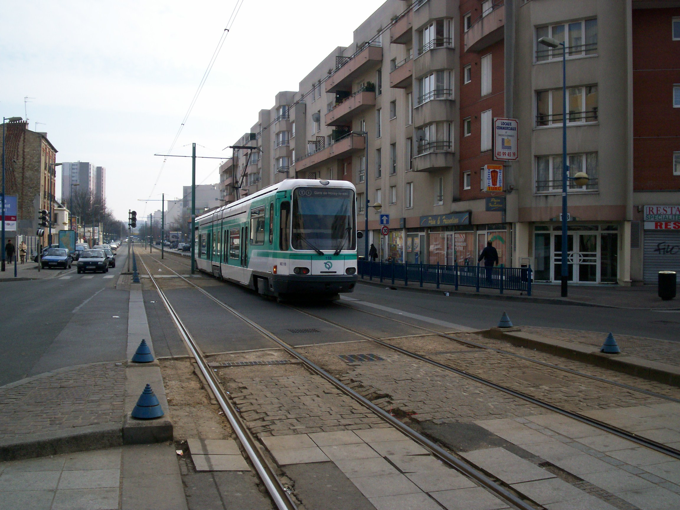 T1 à La Ferme